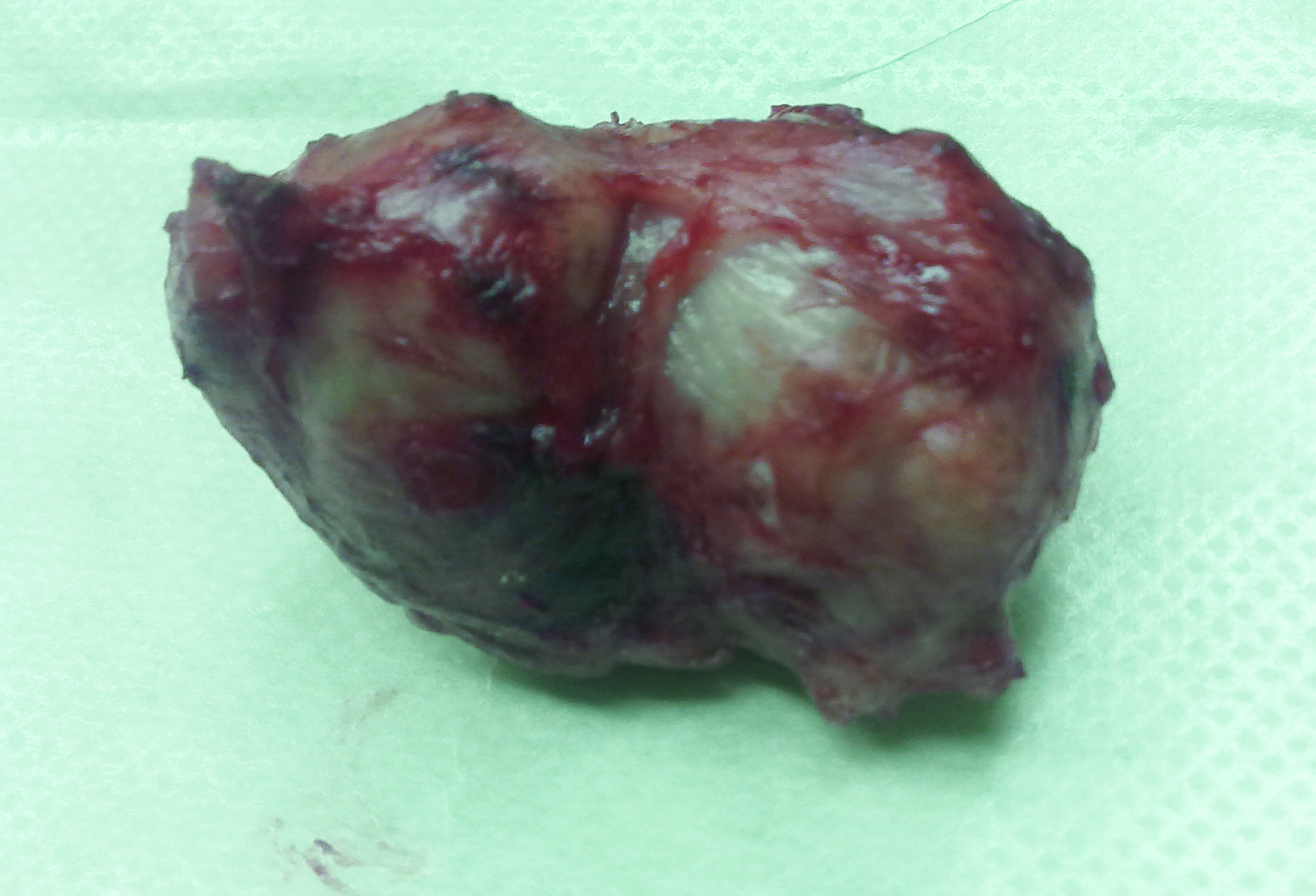 لیومیوم های رحمی که فیبروم هم نامیده می‍‌شوند ، شایع ترین تومور خوش خیم دستگاه تناسلی زنان به حساب می‌آیند . منشا عضلانی دارند و با میزان ترشح استروژن در ارتباط اند